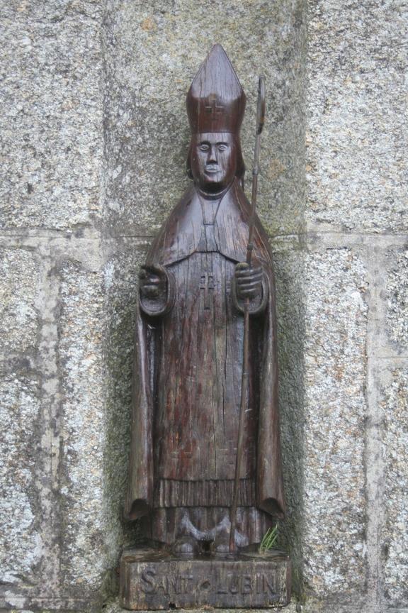 Statue de la fontaine Saint-Lubin, Kergrist-Moëlou, Côtes d'Armor (22)